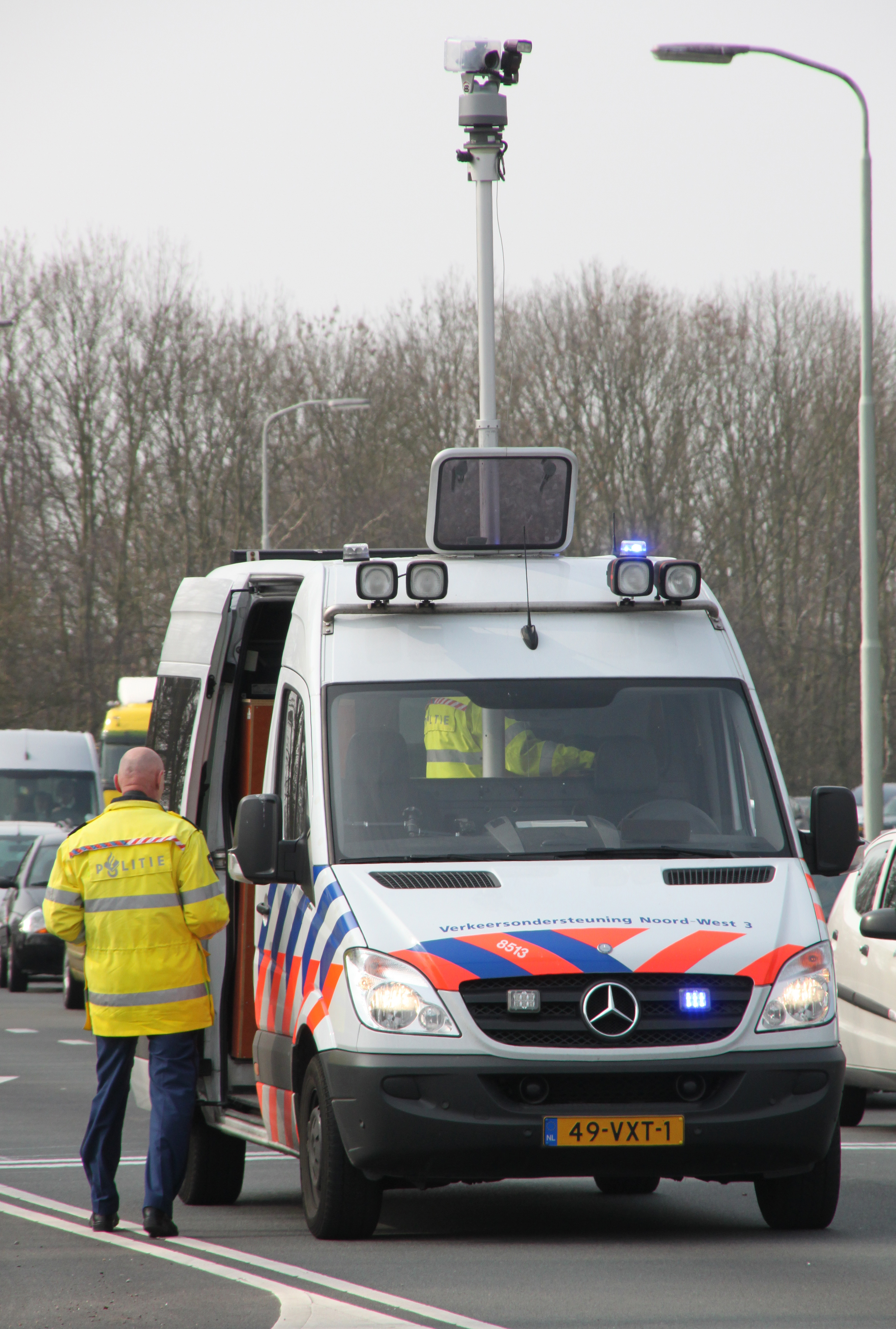 Een voertuig van de Verkeers Ongevallen Analyse maakt een overzichtsfoto bij een aanrijding.